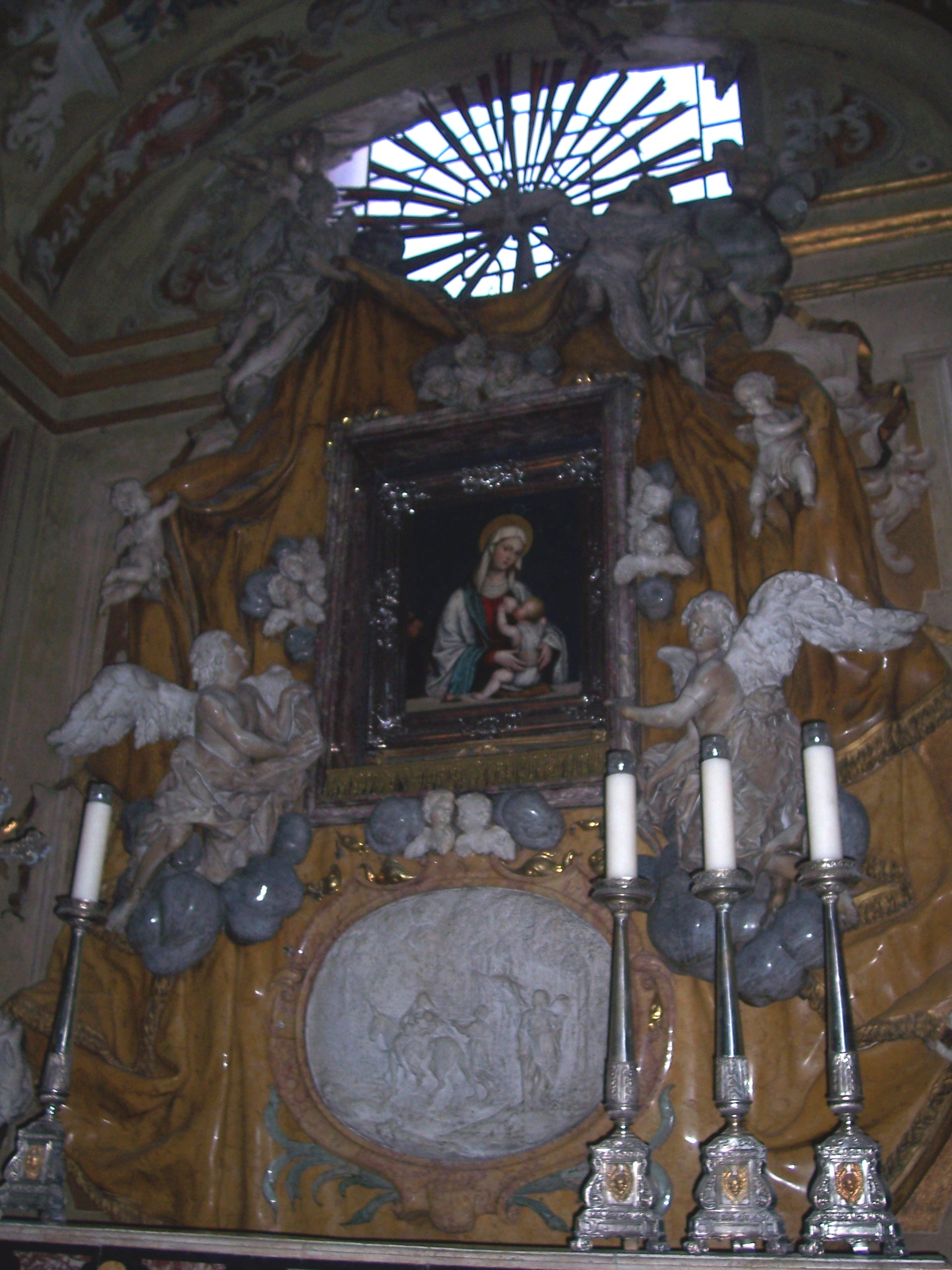 cappella madonna del tabarrino in san giovanni a brescia.